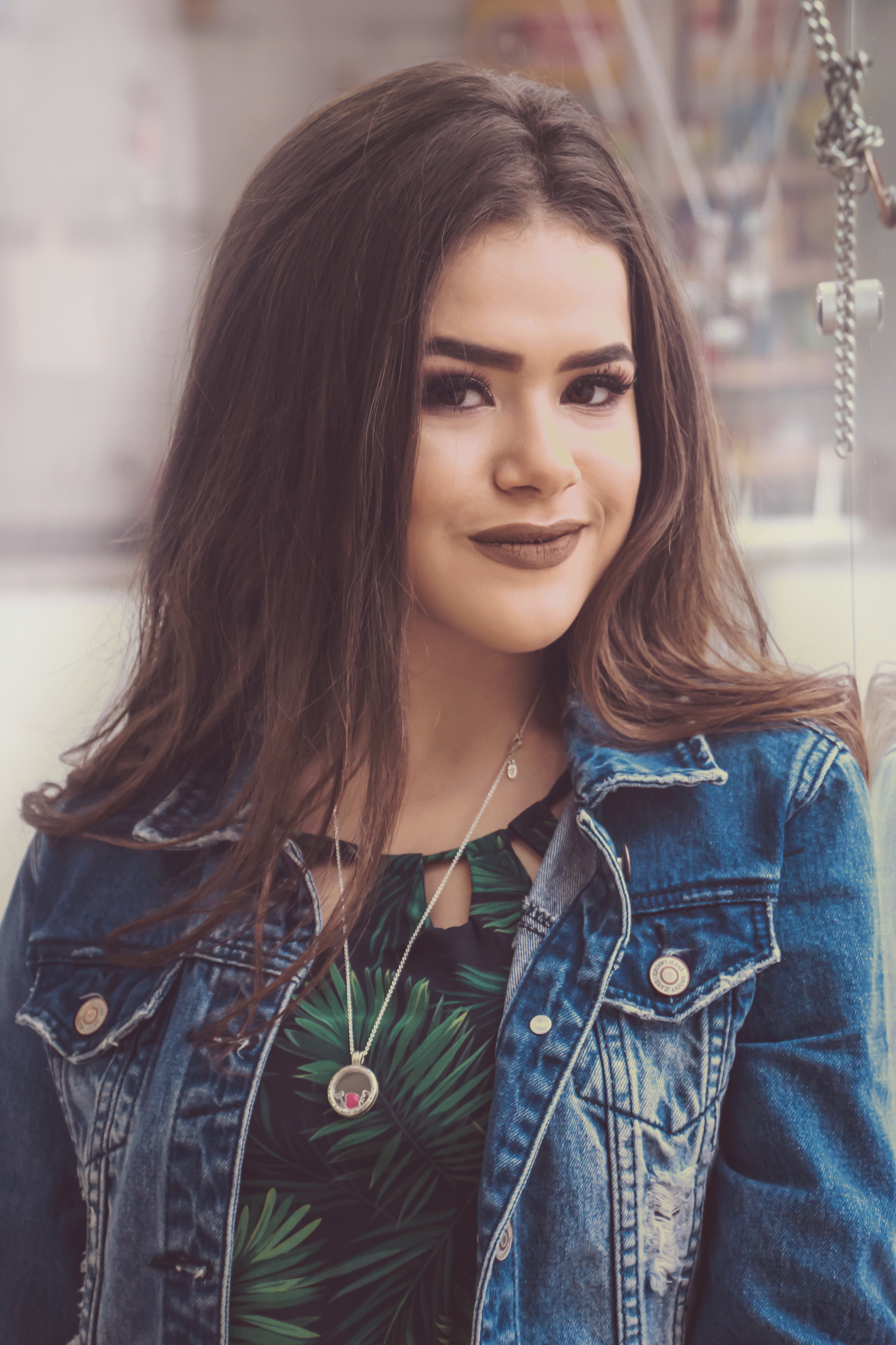 Maisa Silva antes de se apresentar com o seu PocketTour em Serra Negra. (imagem: Agosto/2017)